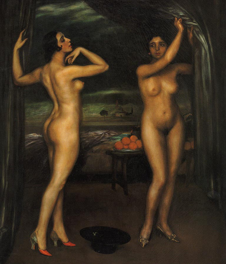 Rivalidad. 1925-1926. Óleo y temple sobre lienzo. 170 x 140 cm. Arturo Uriante, Argentina.